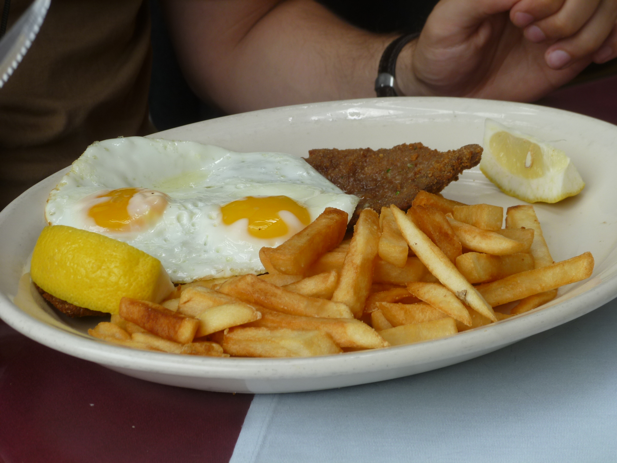 milanesa, papas fritas y huevo frito (Milanesa a caballo)